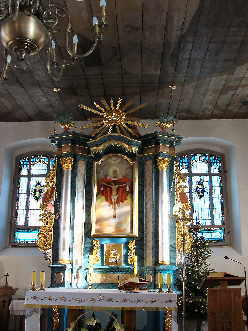 Kościół Św. Trójcy - Szczecin Krzekowo